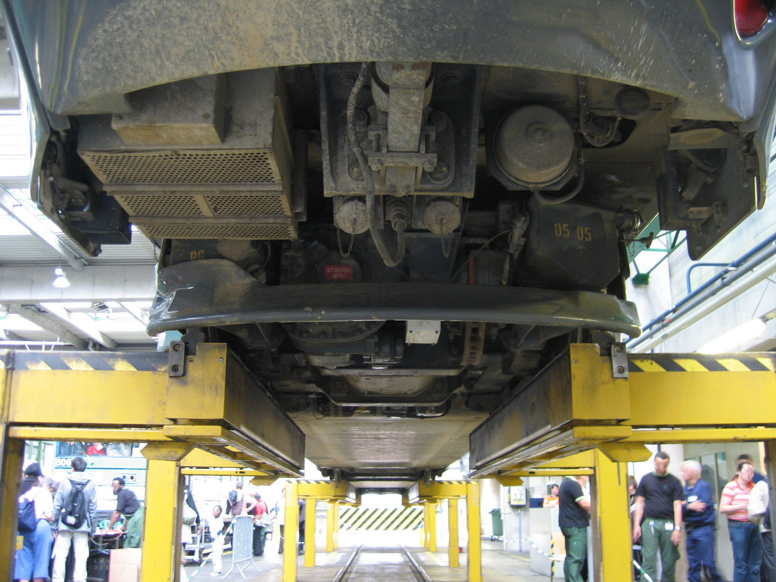 Dessous d'un TFS de la ligne T1 du tramway de Paris. JPO Atelier de Bobigny 24/05/2008.